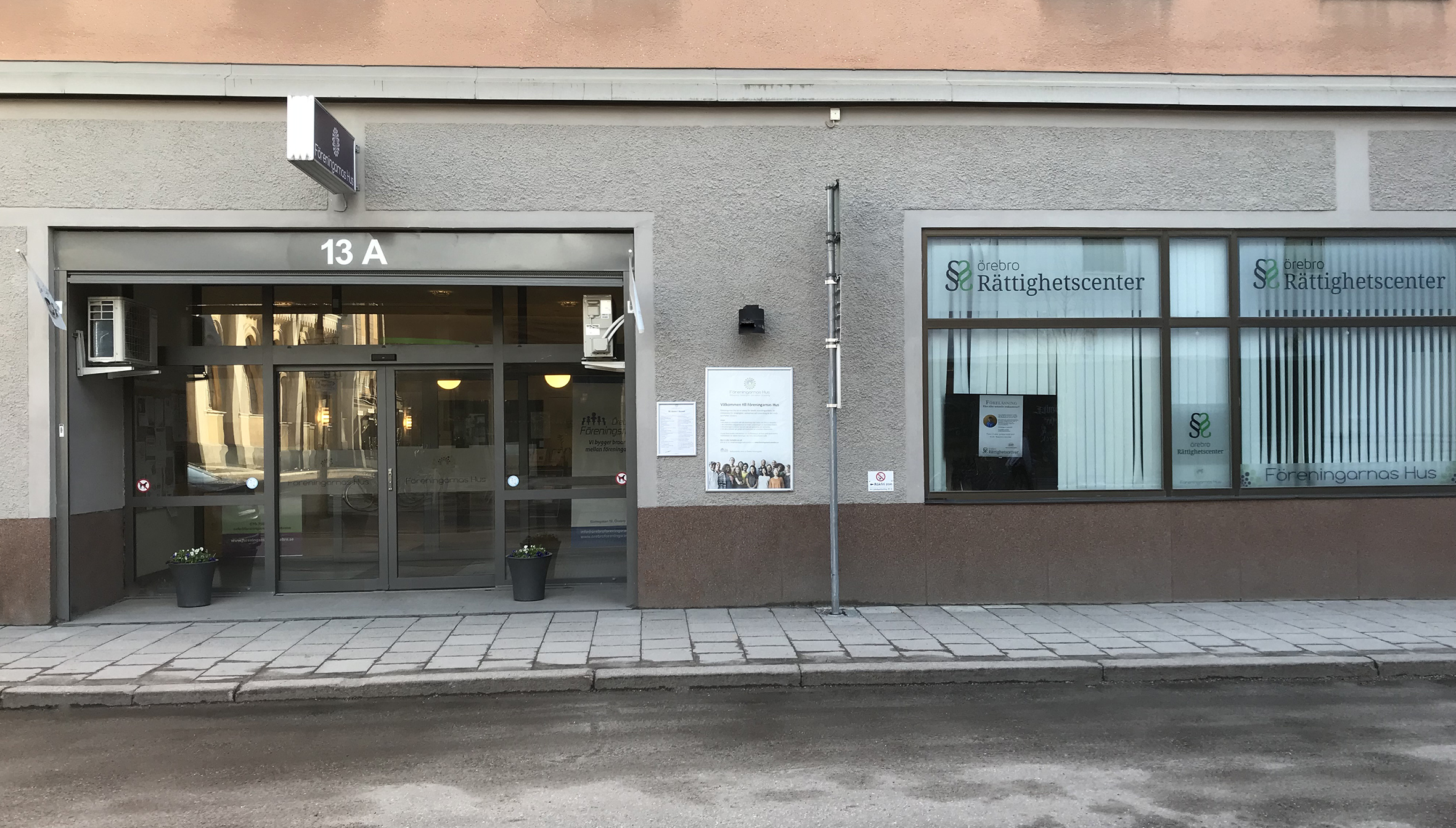 Rättighetscenters kontor vid Föreningarnas hus på Slottsgatan 13A i Örebro